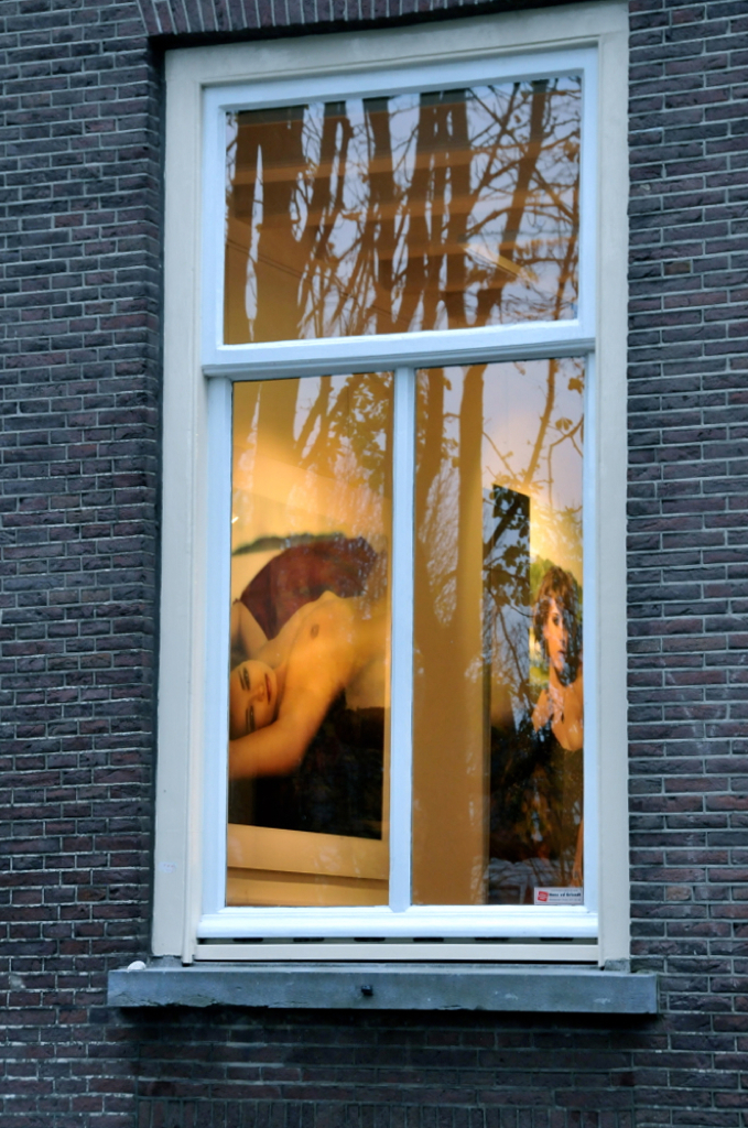 In Galerie Mark Peet Visser in Den Bosch is een piepkleine tentoonstelling van foto's van de Belgische fotograaf Marc Lagrange, die dit jaar zijn 20 jarig jubileum als fotograaf viert. Lagrange is bekend door zijn zeer erotische foto's.